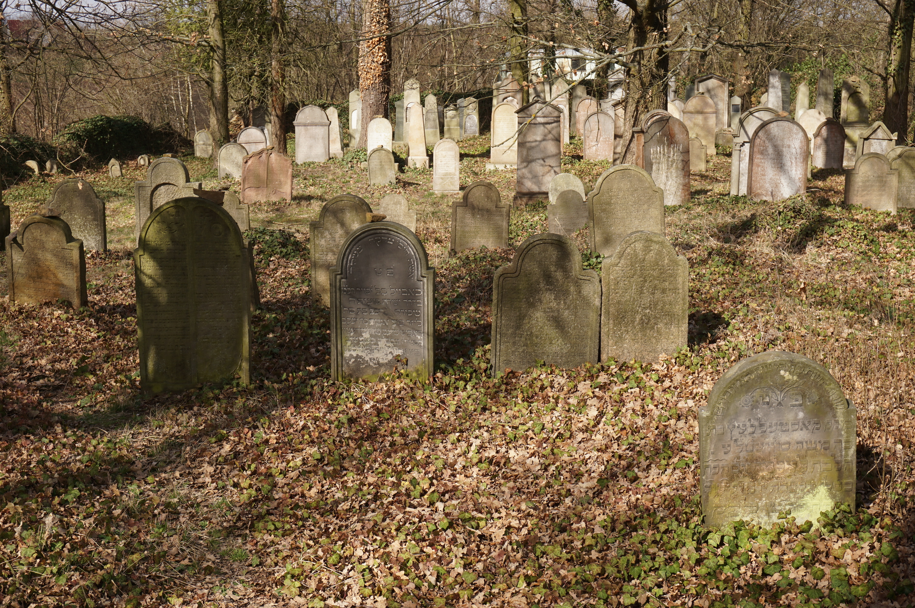 Židovský hřbitov, 750 m jihojihozápadně od kostela, Kostelec u Křížků.